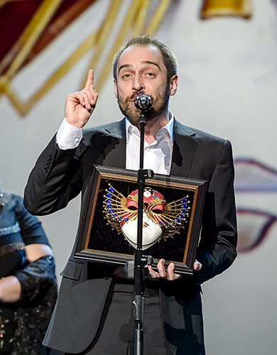 Фестиваль «Золотая маска» 2015 года